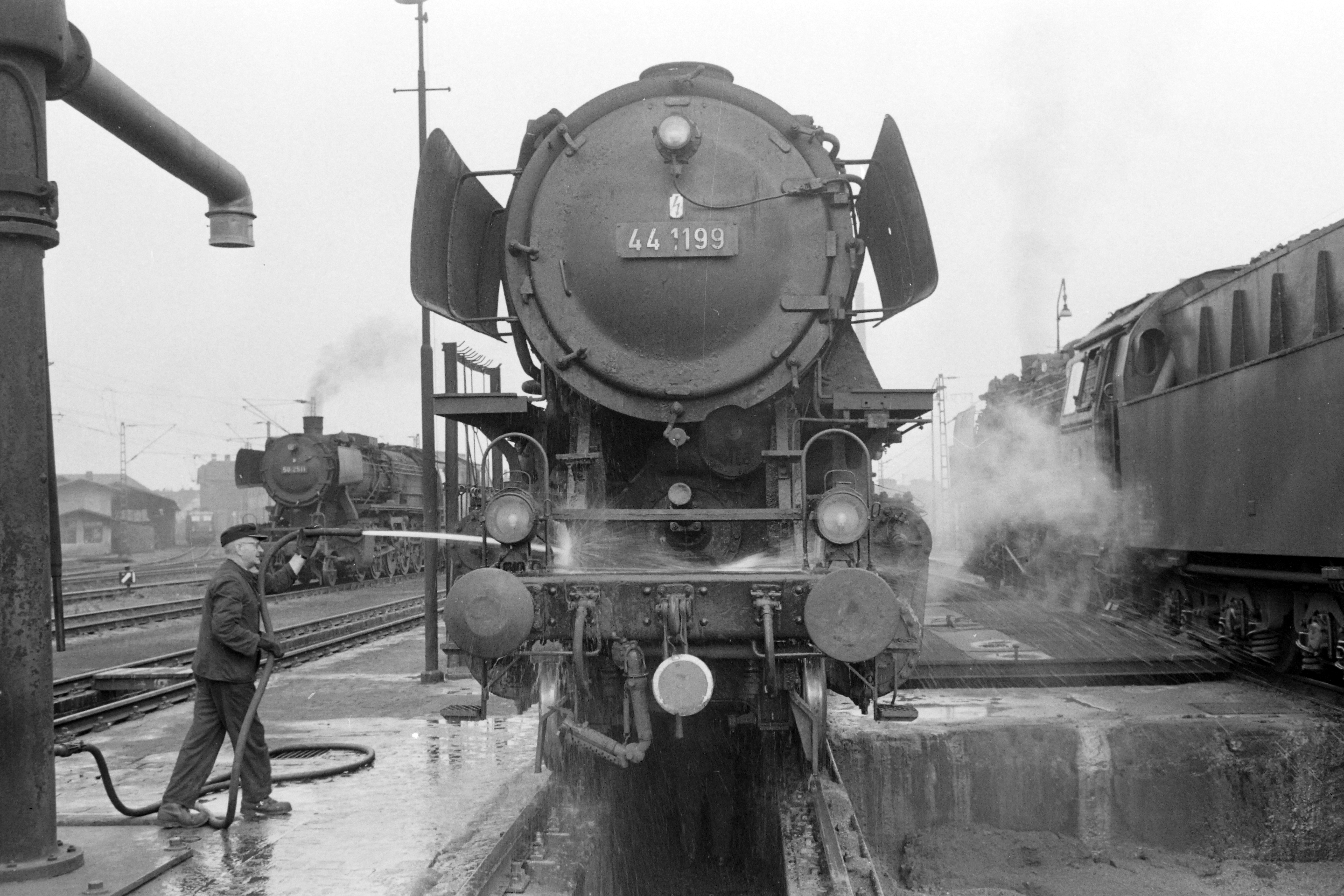 Diese noch undatierte Aufnahme aus dem Nachlass des Fotografen Jochen Mellin zeigt einen Eisenbahn-Angestellten beim Abspritzen der Lokomotive aus der DR-Baureihe 44 mit der Nummer 44 1199 über einer Grube (Bildmitte) auf einem Betriebshof (BW) oder einem noch näher zu bestimmenden Eisenbahn-Ausbesserungswerk. Weiter links sind weitere Loks zu sehen, darunter - dank des in diesem Fall vorliegenden hochaufgelösten Digitalisats - diejenige aus der DR-Baureihe 50 mit der Nummer 50 2511. Das Digitalisat wurde am 27. Juni 2017 erstmals vom Bildarchiv der Region Hannover (Signatur ARH NL Mellin 01-018/0009) der Öffentlichkeit mit der Lizenz CC BY-SA 3.0 zur Verfügung gestellt ...